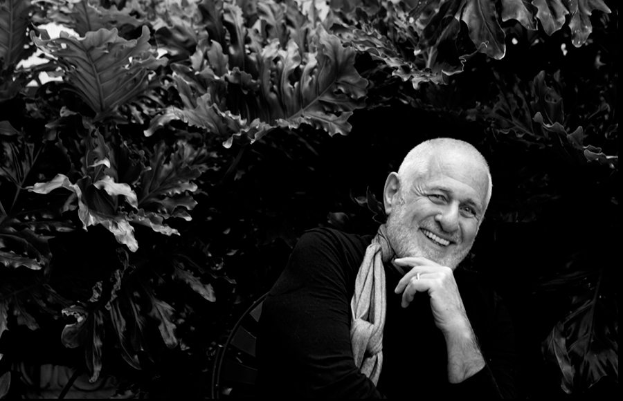 Richard Saul Wurman